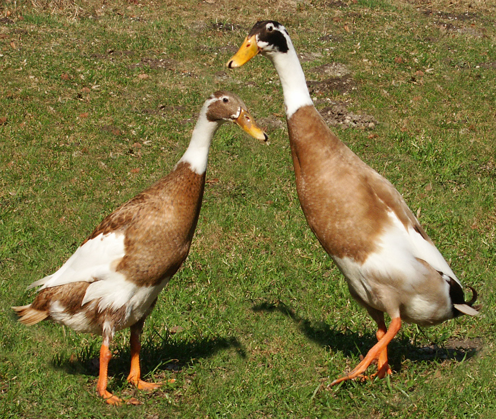 1,1 Laufenten rehfarben-weissgescheckt, ca. 1 Jahr alt